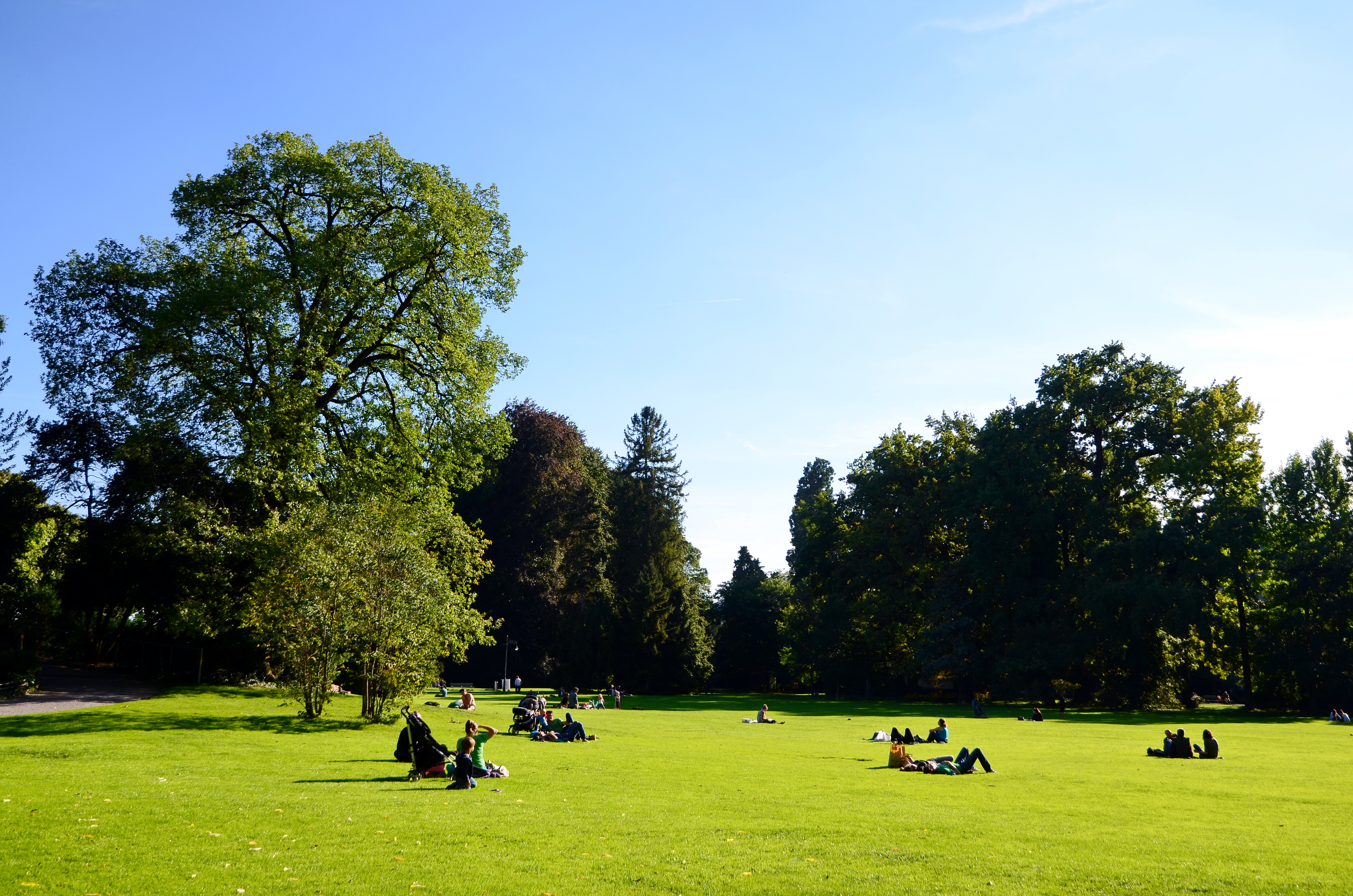 Arboretum in Zürich-Enge